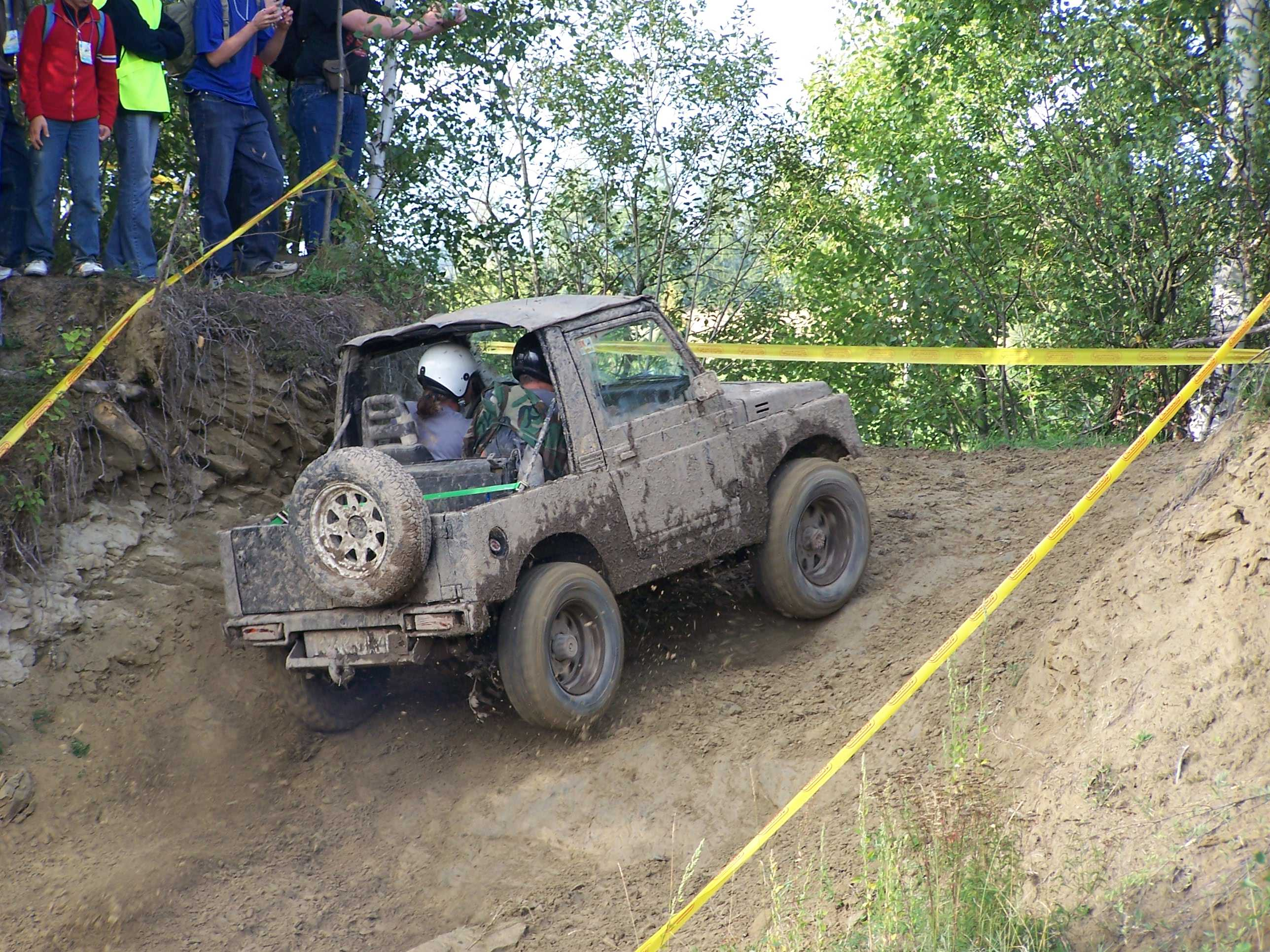 Samochód terenowy